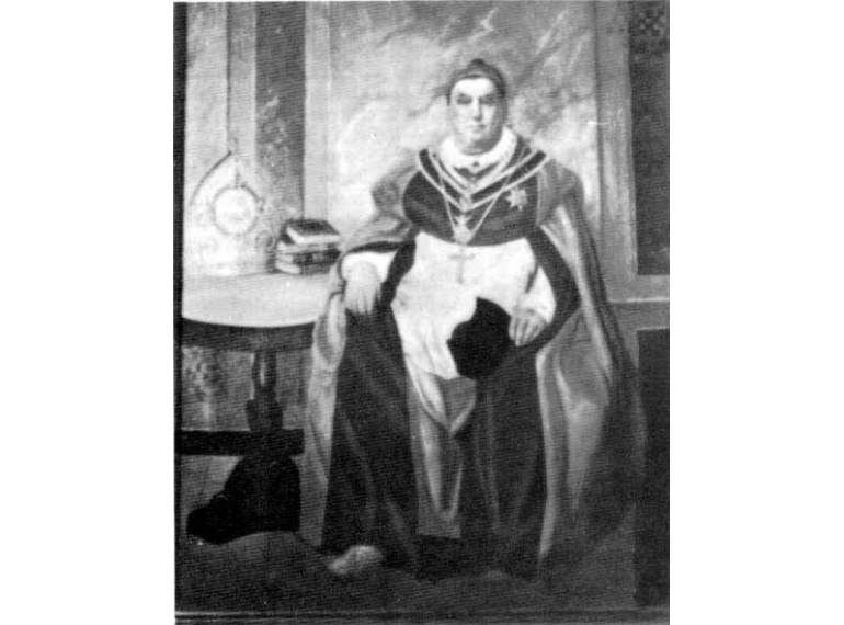 Obispo Juan José de Aycinena y Piñol. Clérigo y politico conservador muy influyente en Guatemala durante el regimen de Rafael Carrera.